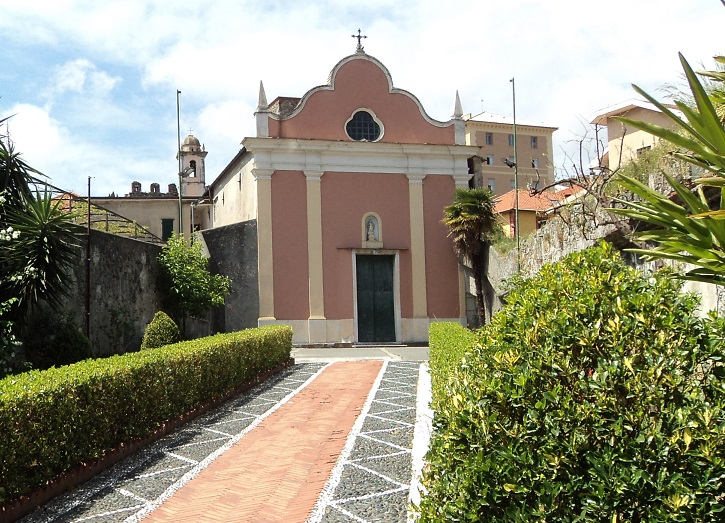 Foto della chiesa presa dalla cancellata, dalla rotonda del centro storico di Varazze (SV)